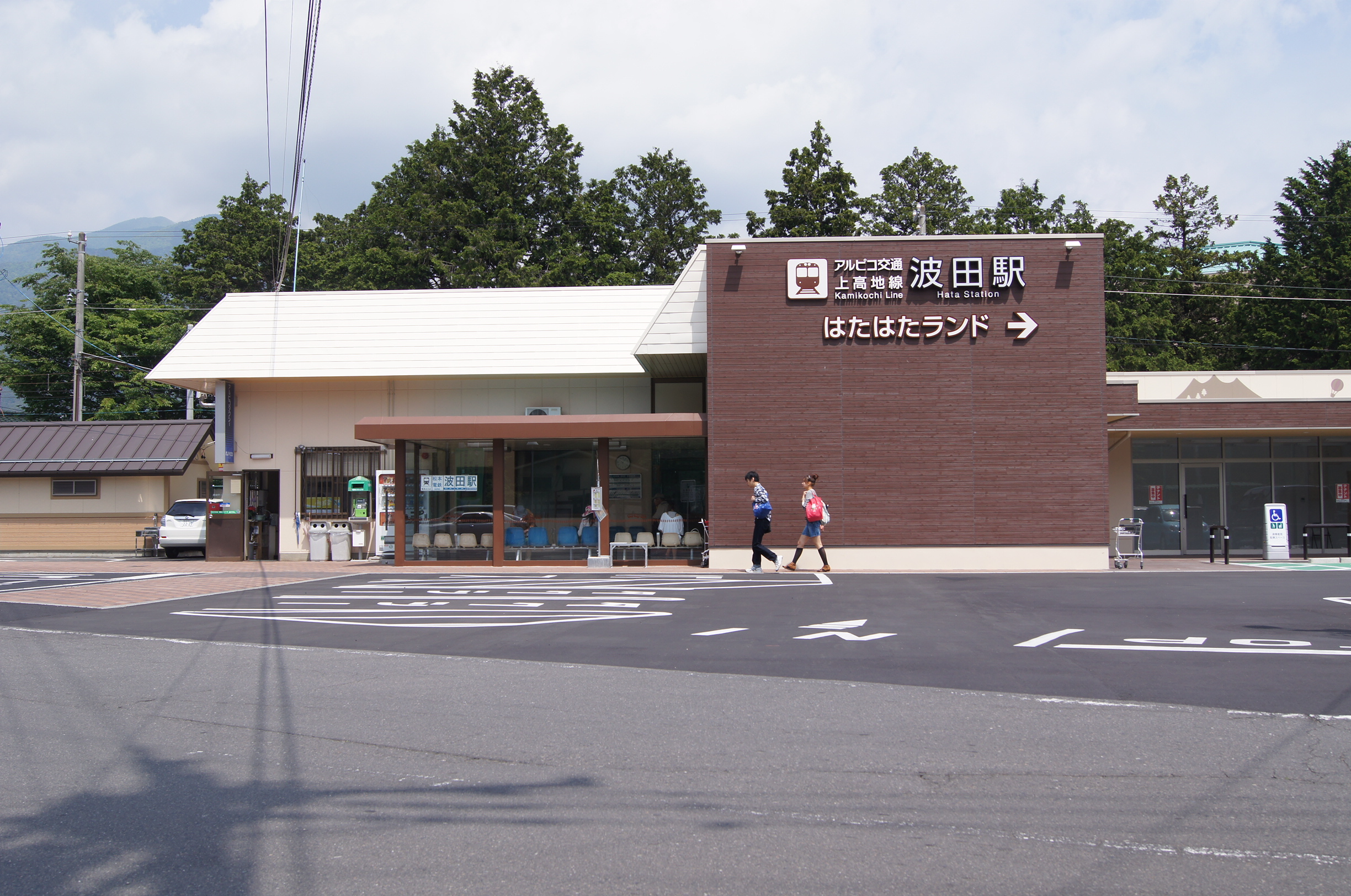 長野県松本市波田にある波田駅に隣接する建物（2012年4月15日供用開始と駅員から聴取）と、同時にリフォームされた駅舎